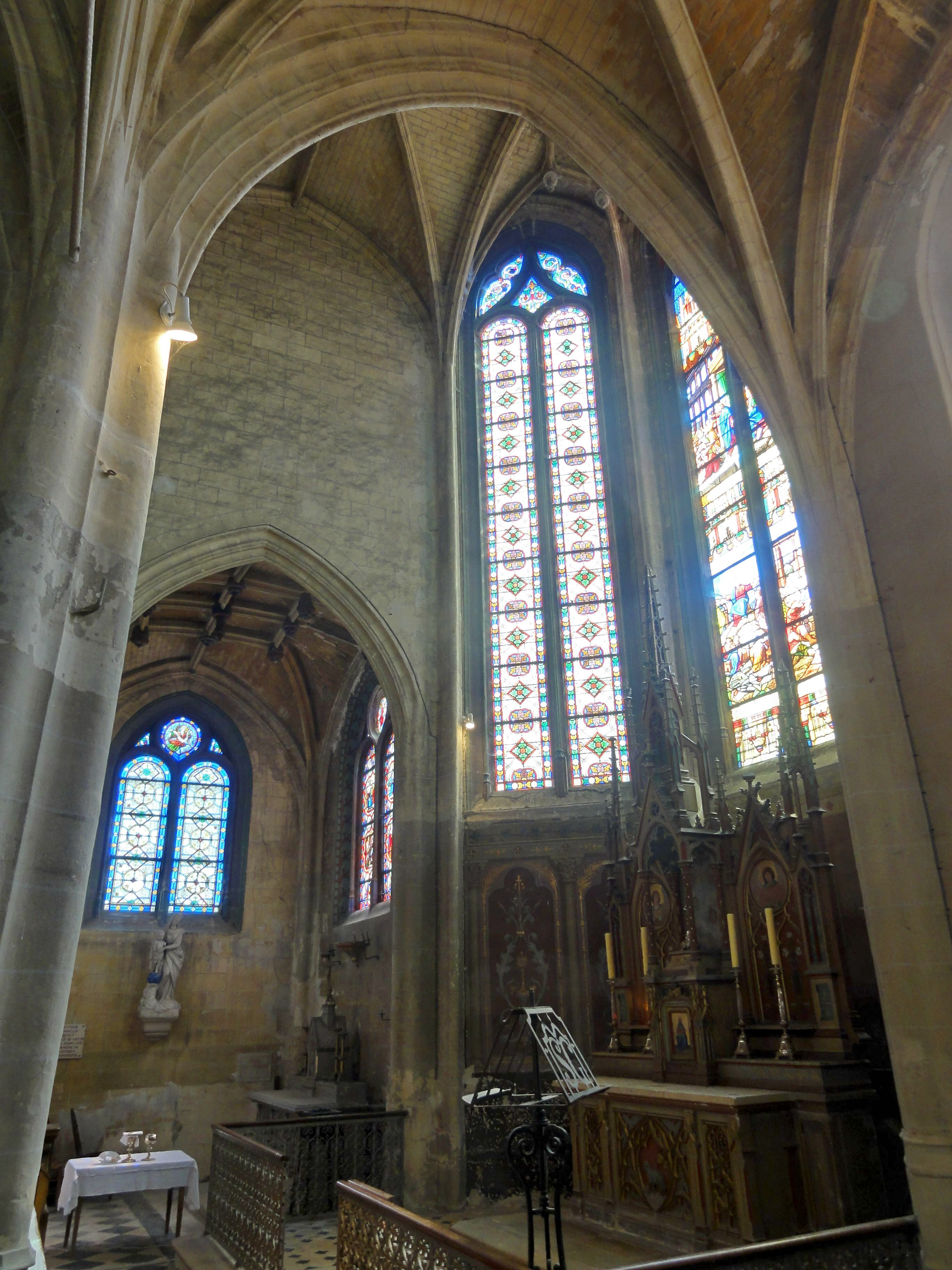 Abside, vue depuis le collatéral sud.